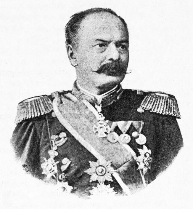 Јован Белимарковић (1827 - 1906) Source: Světozor 1889 / 19 / 228 Date: 1889-04-15